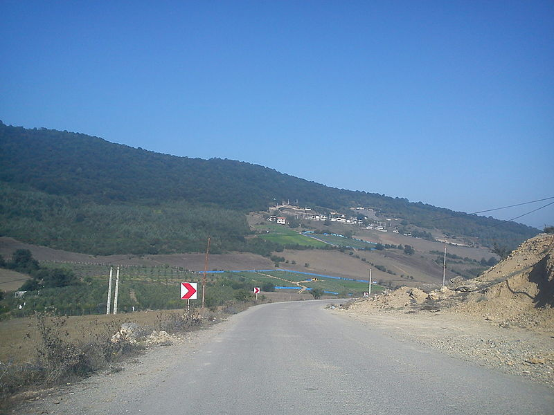 سنگ چشمه روستائی در شهرستان ساری